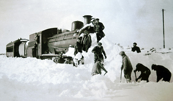 Tren del Ferrocarril de Comodoro Rivadavia con las vias cubiertas con nieve, cerca de la estación Pampa del Castillo.